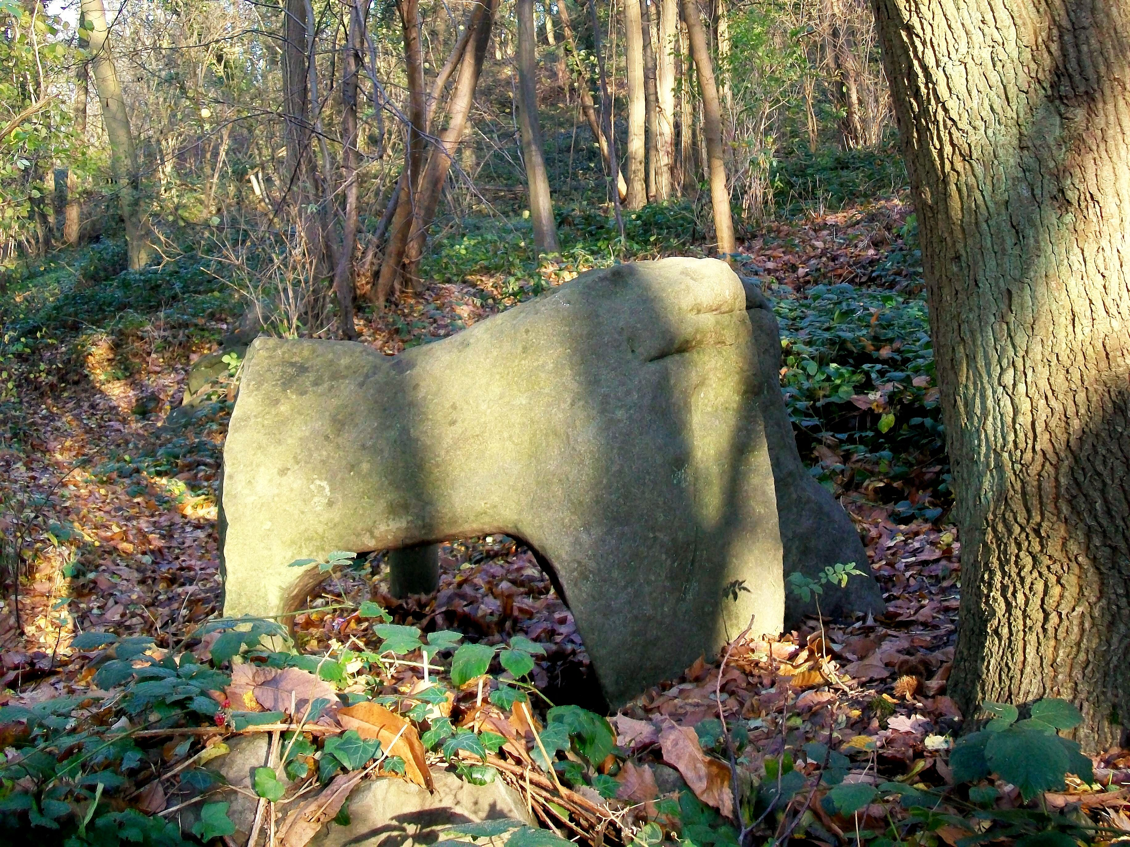 L'un des rochers en grés qui se trouvent en plusieurs endroits dans la Garenne du Houx à Survilliers (95).